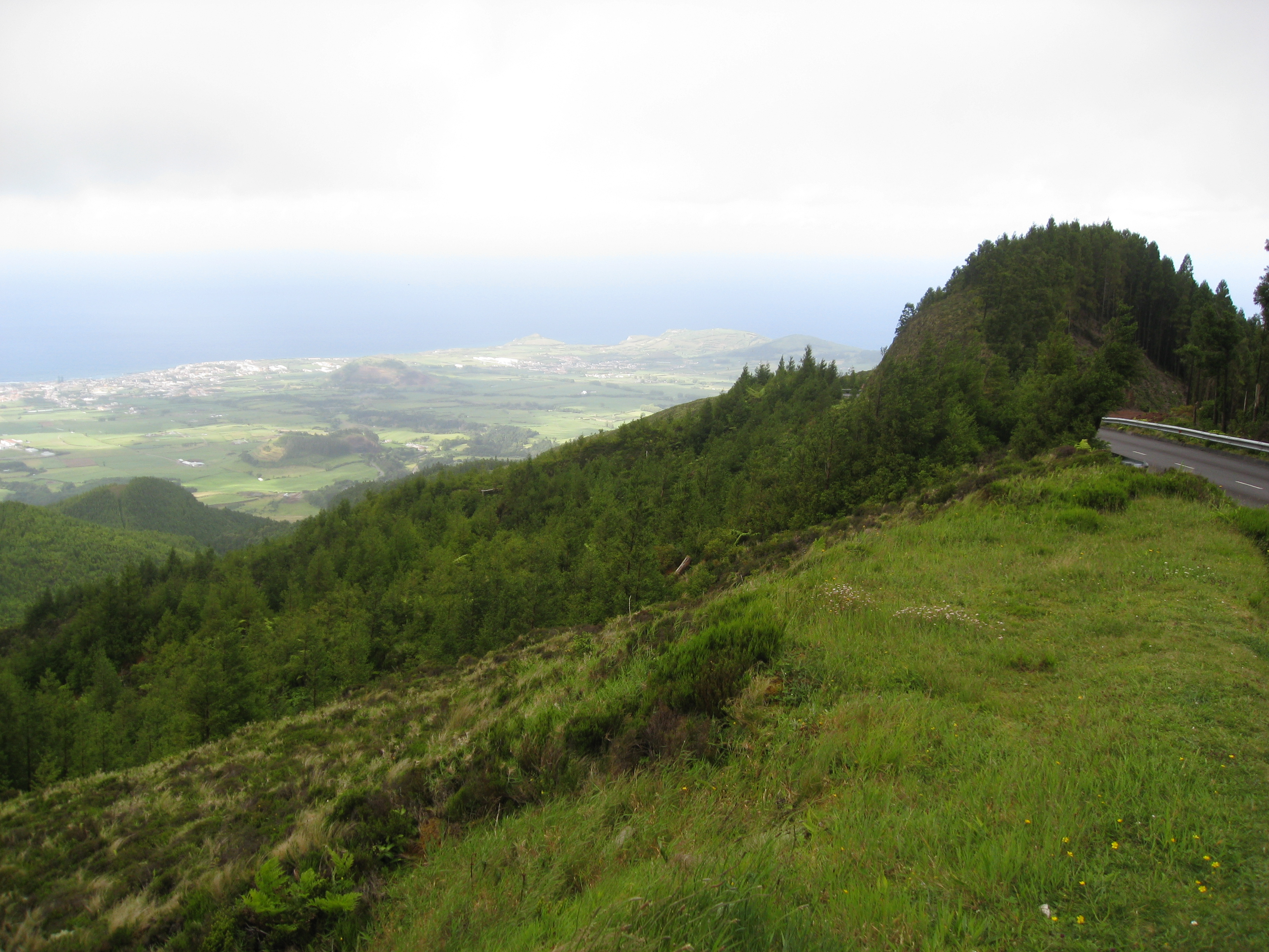 EN5-2A, 9600, Portugal